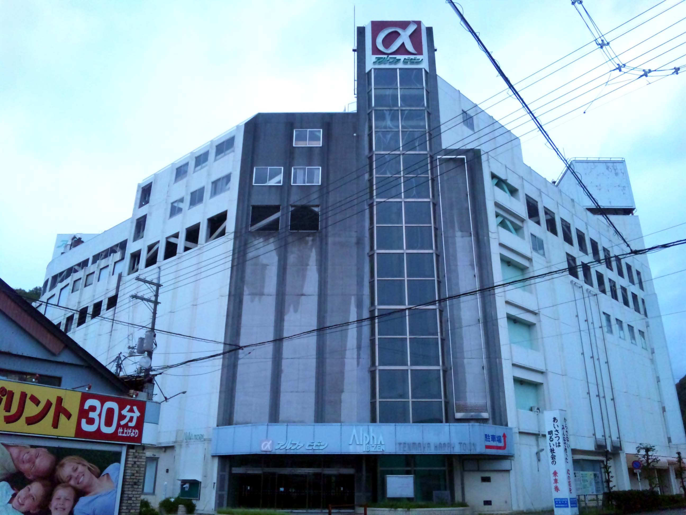 アルファ備前 備前市西片上